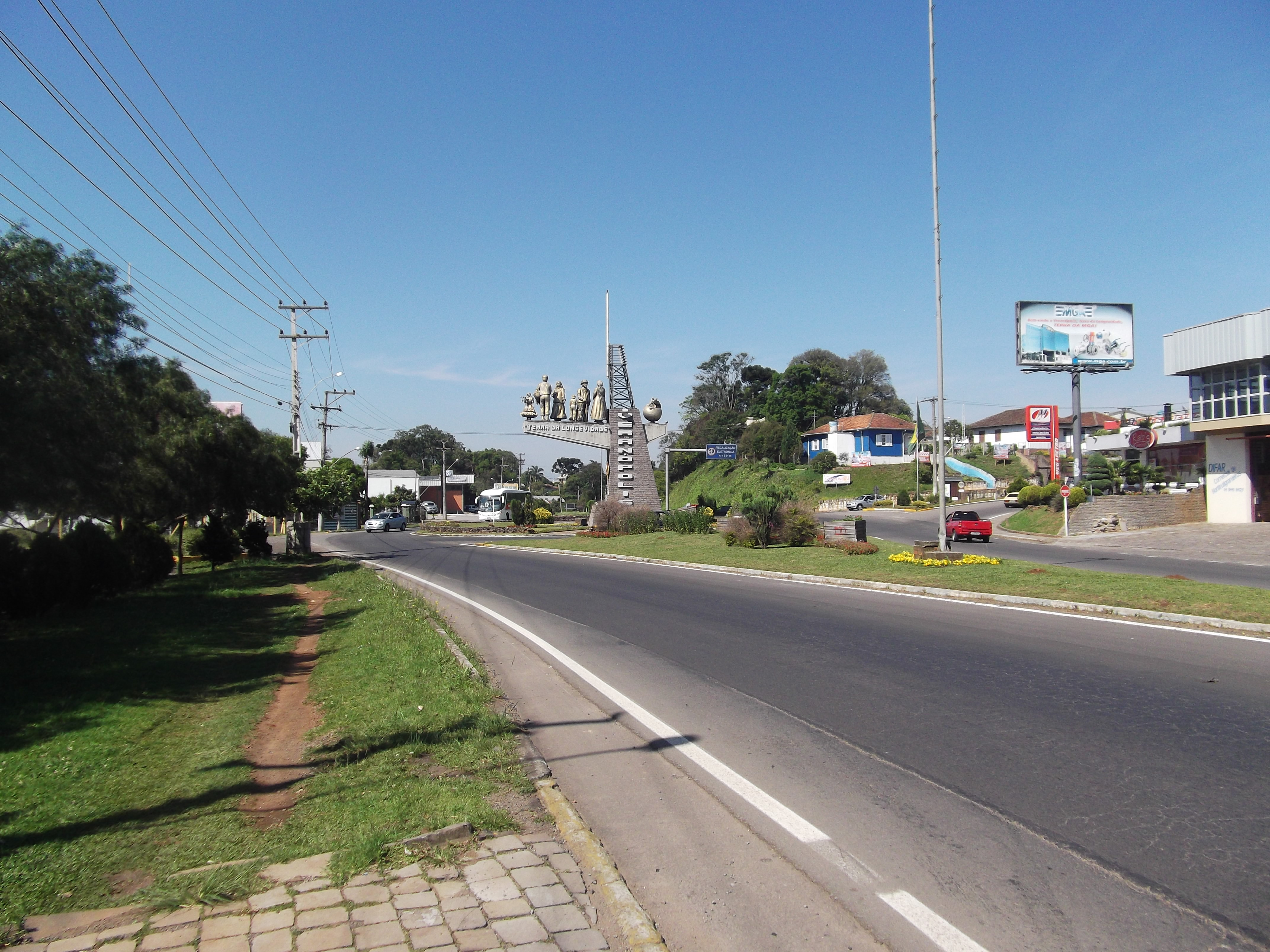 Portico de Entrada